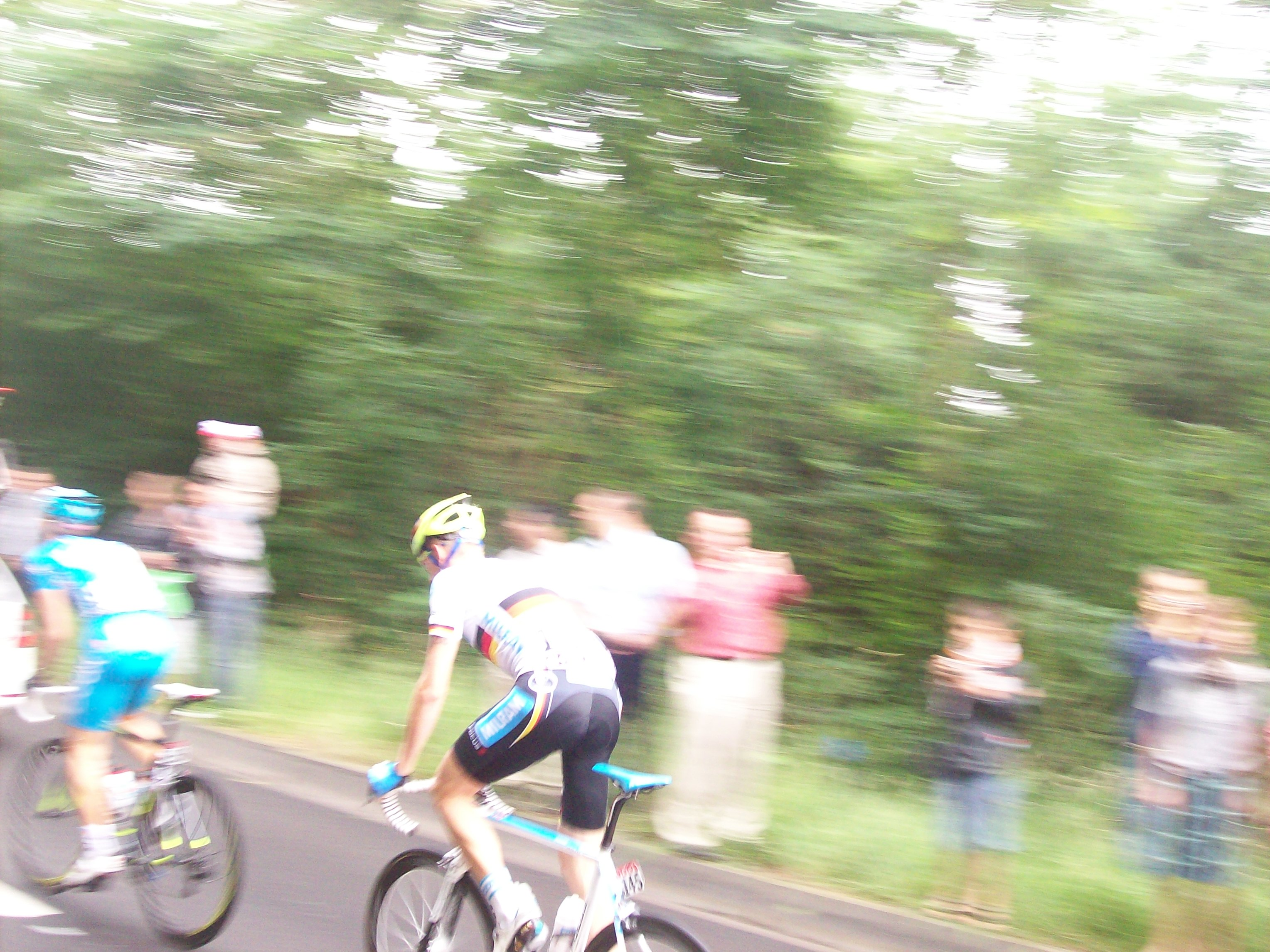 Christian Knees, lors de la 2e étape du Tour de France 2010 à Chaumont-Gistoux, province du Brabant wallon, Belgique.